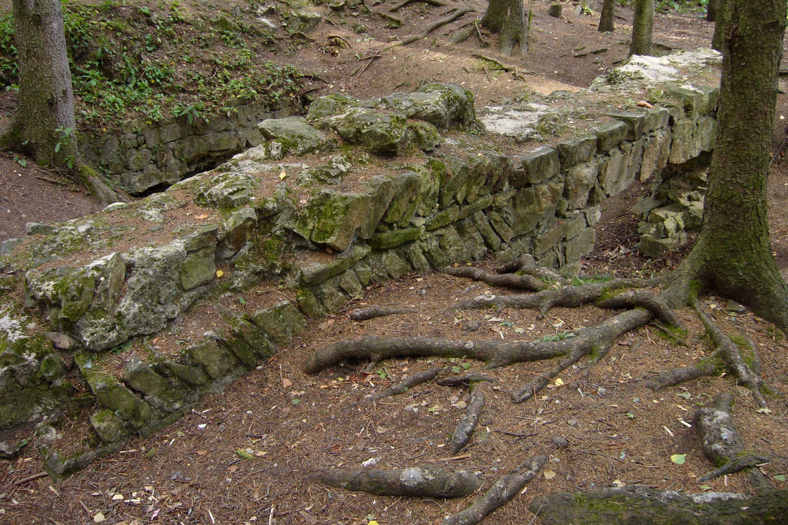 Nádvorní strana palácové zdi se zdivem typu opus spicatum